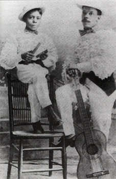 sindo garay y pepe sanchez, 1906 cuando sindo tenia 39 años